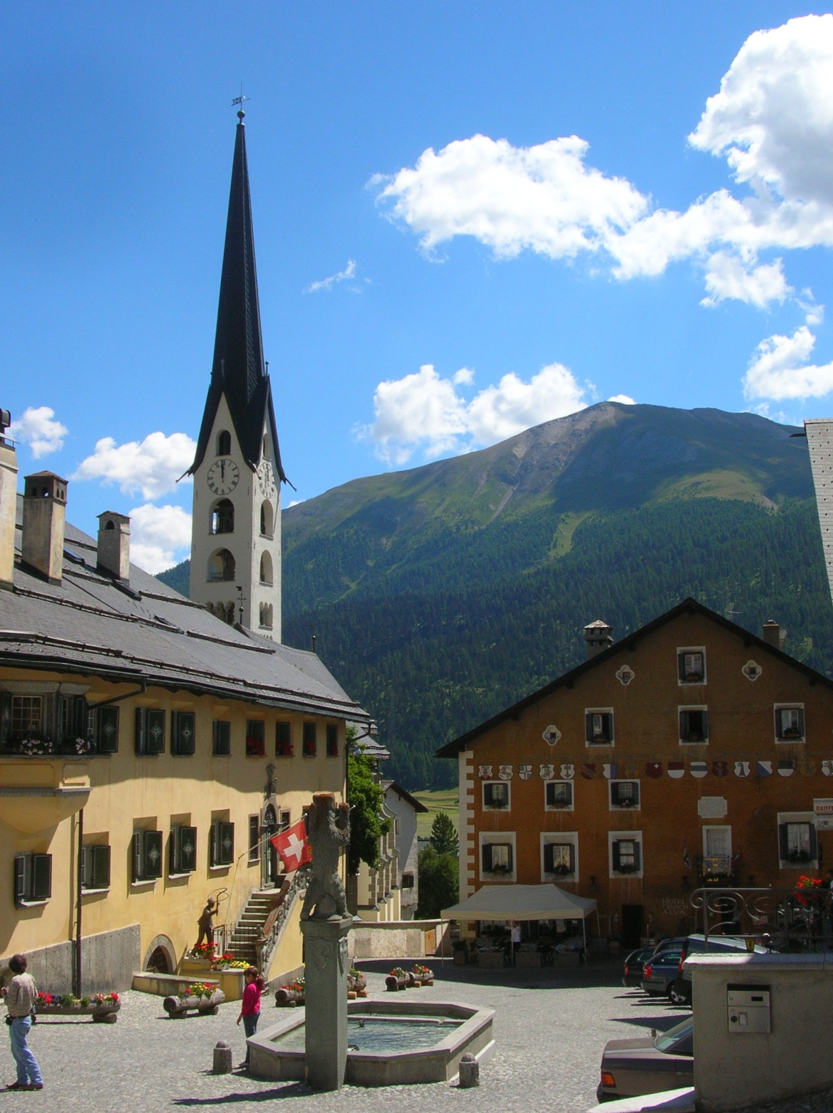 Zuoz (Suisse)